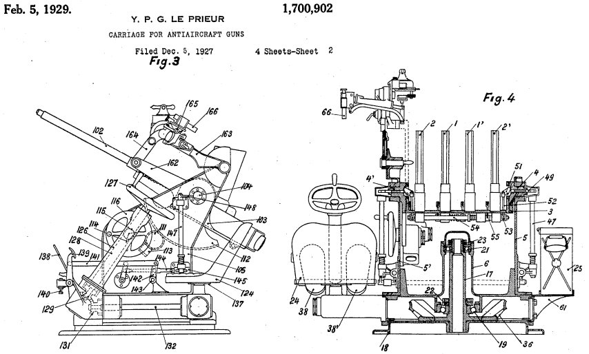 US Patent filed by Yves Le Prieur for a quadruple machine gun carriage